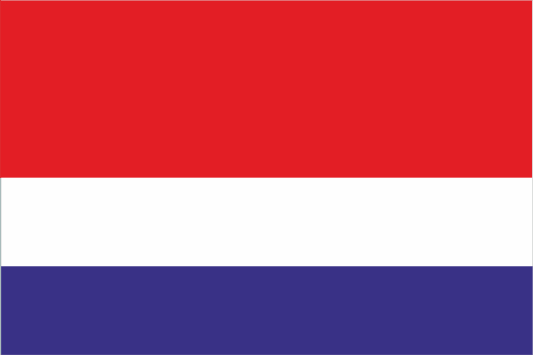 Paño rectangular, de proporciones 2/3, dividida horizontalmente por mitad, de color rojo la parte superior y la inferior dividida a su vez por mitad, de color blanco la porción superior y azul la inferior.